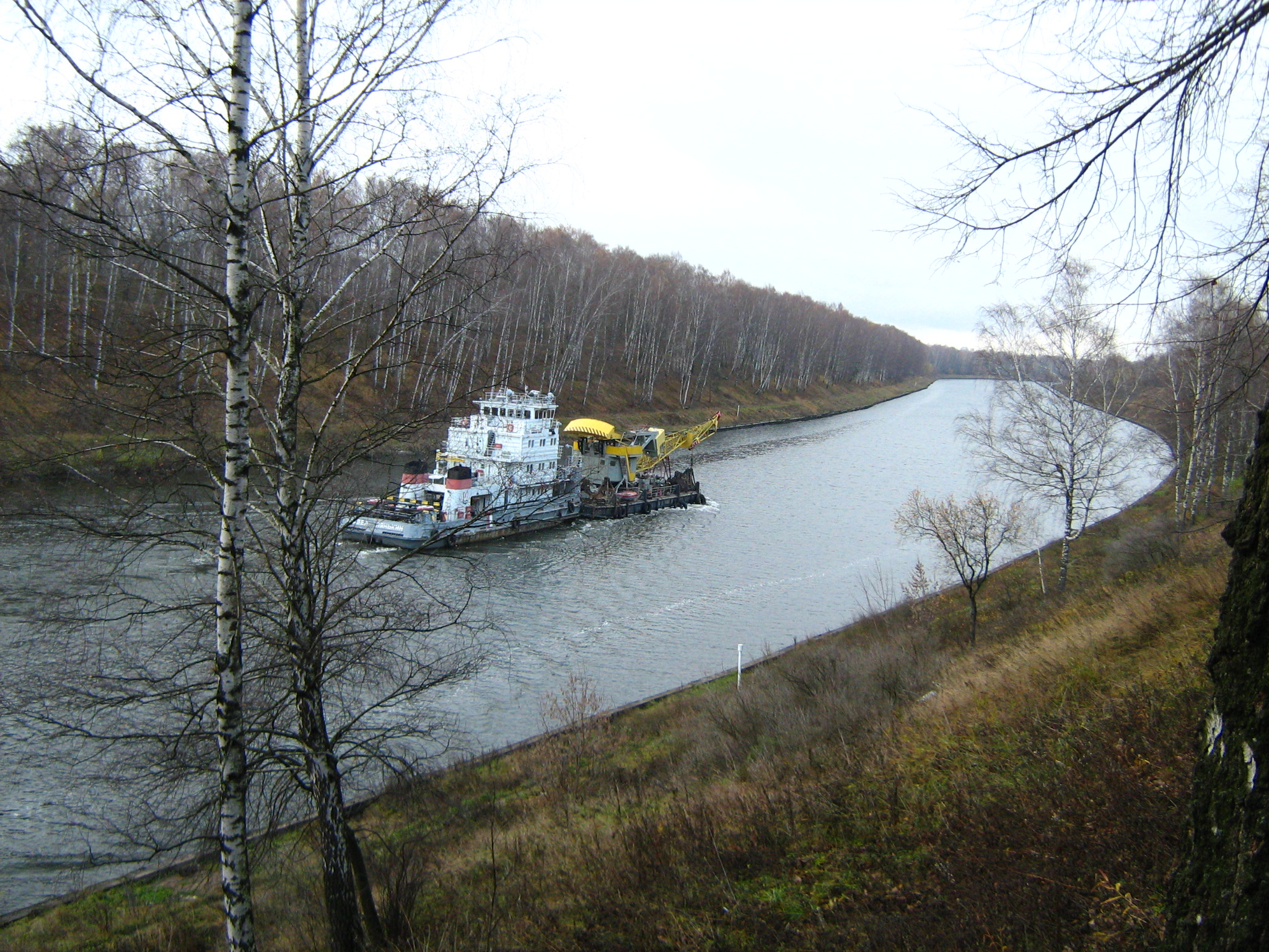 The deepest groove on Moscow-Volga canal, "Глубокая выемка", канал Москва-Волга